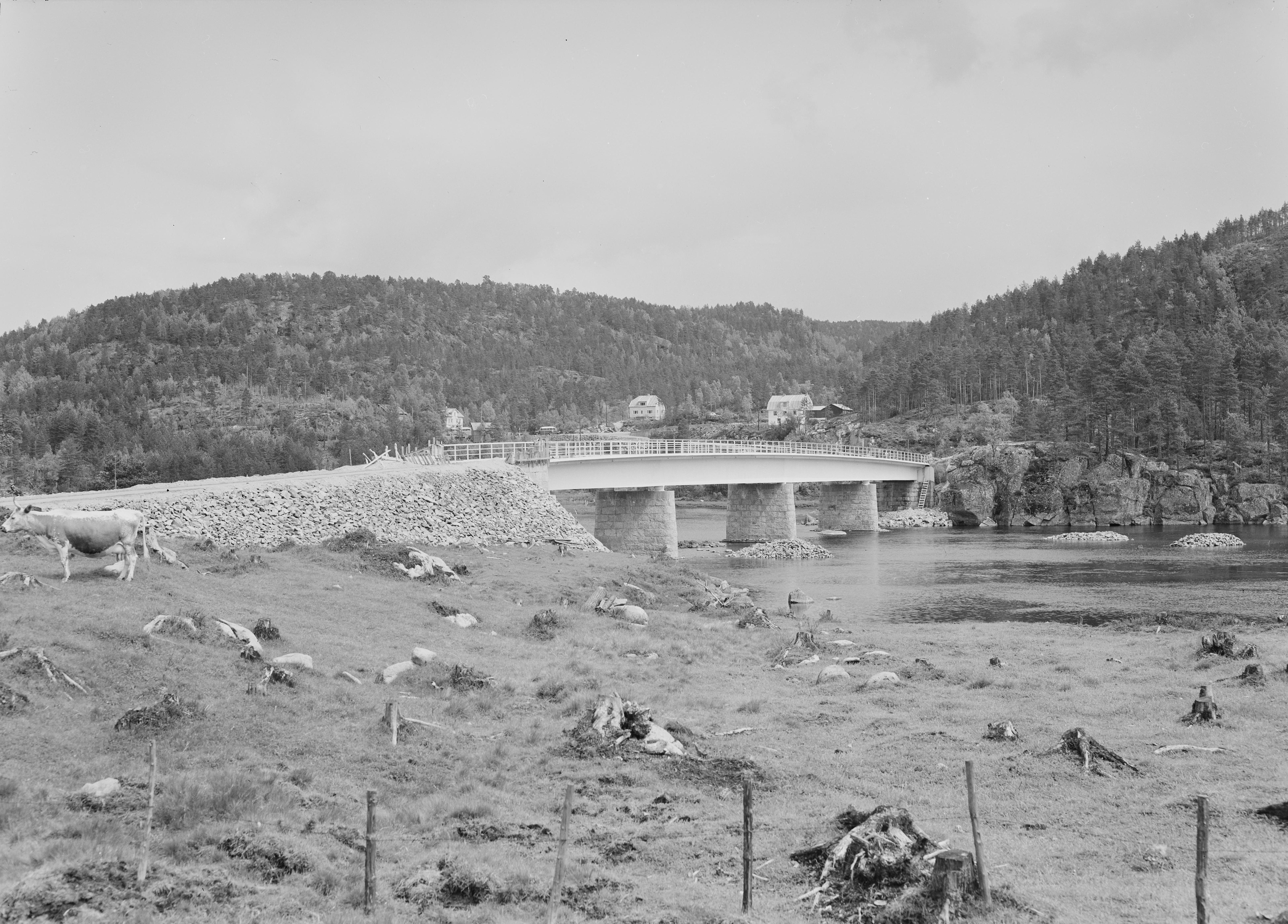 Bildet er hentet fra Nasjonalbibliotekets bildesamling. Anmerkninger til bildet var: Fotograf : L.S. Sveindal, Audnedal, Vest Agder